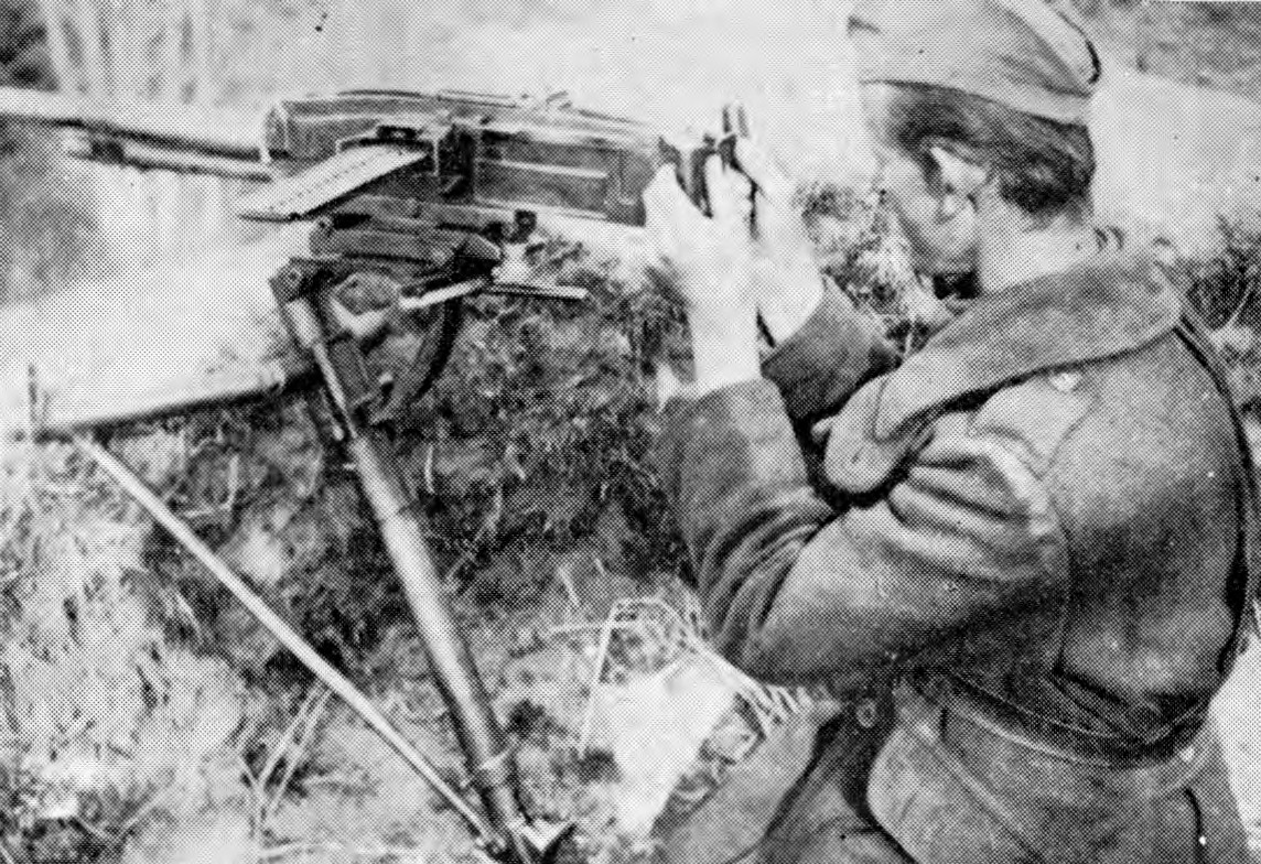 Borec Gradnikove brigade z italijanskim težkim mitraljezom Bredo